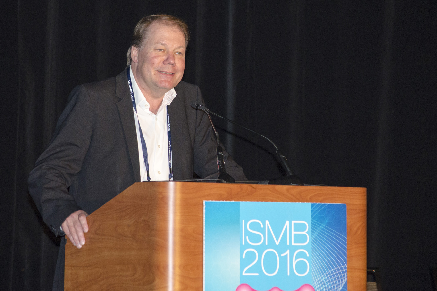 Søren Brunak at ISMB 2016